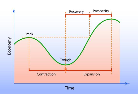 Cykl koniunkturalny. Budowa cyklu.